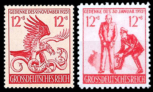 Почтовая марка Германии, посвящённая годовщине "пивного путча" 1923 года, 12+8 пфеннигов, 1944 год. Британская марка-пародия, Гиммлер сковывает кандалами гражданина Германии, декабрь 1944 года.